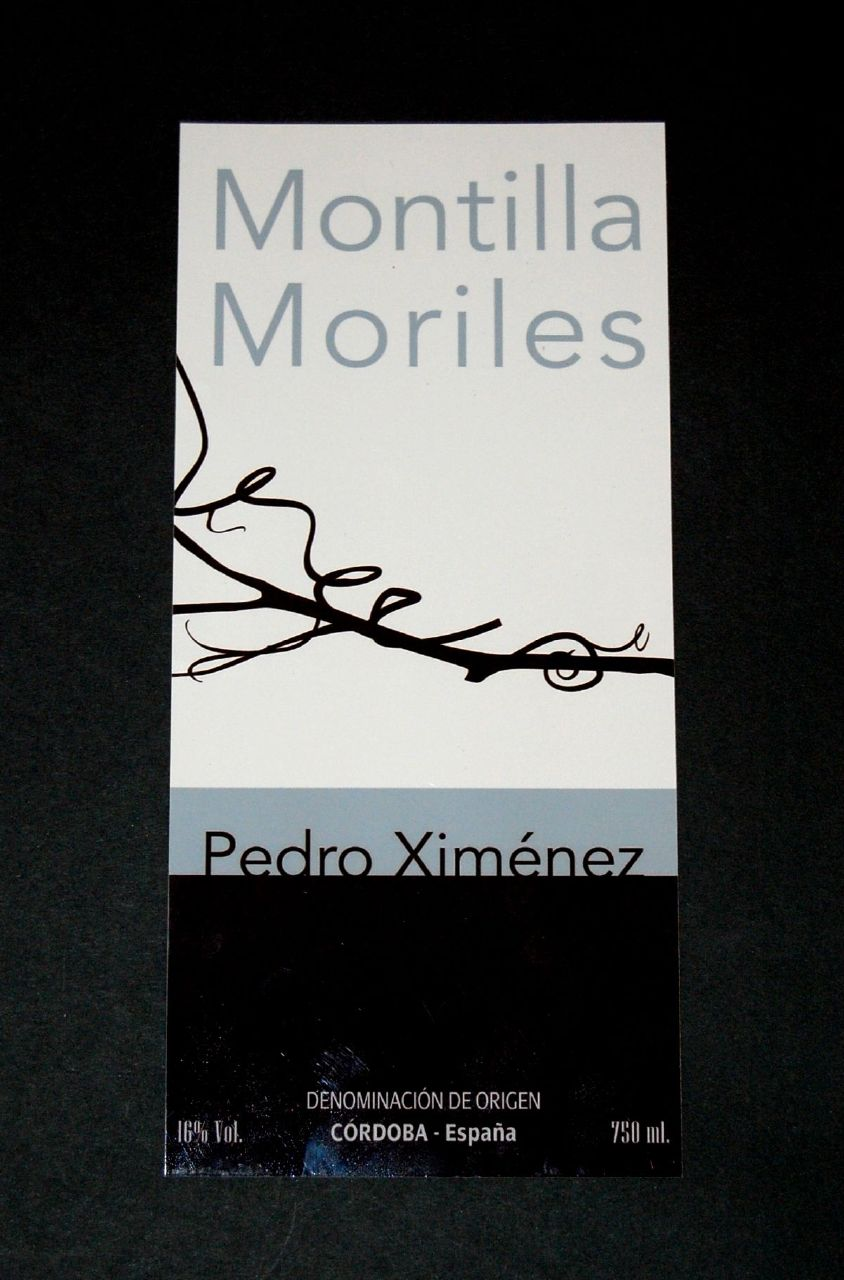 Valentín García Rodríguez, tercer premiado en el I Concurso de Etiquetas celebrado dentro de la III Feria Vitivinícola de Andalucía celebrada en Montilla los días 8 al 10 de noviembre de 2007.